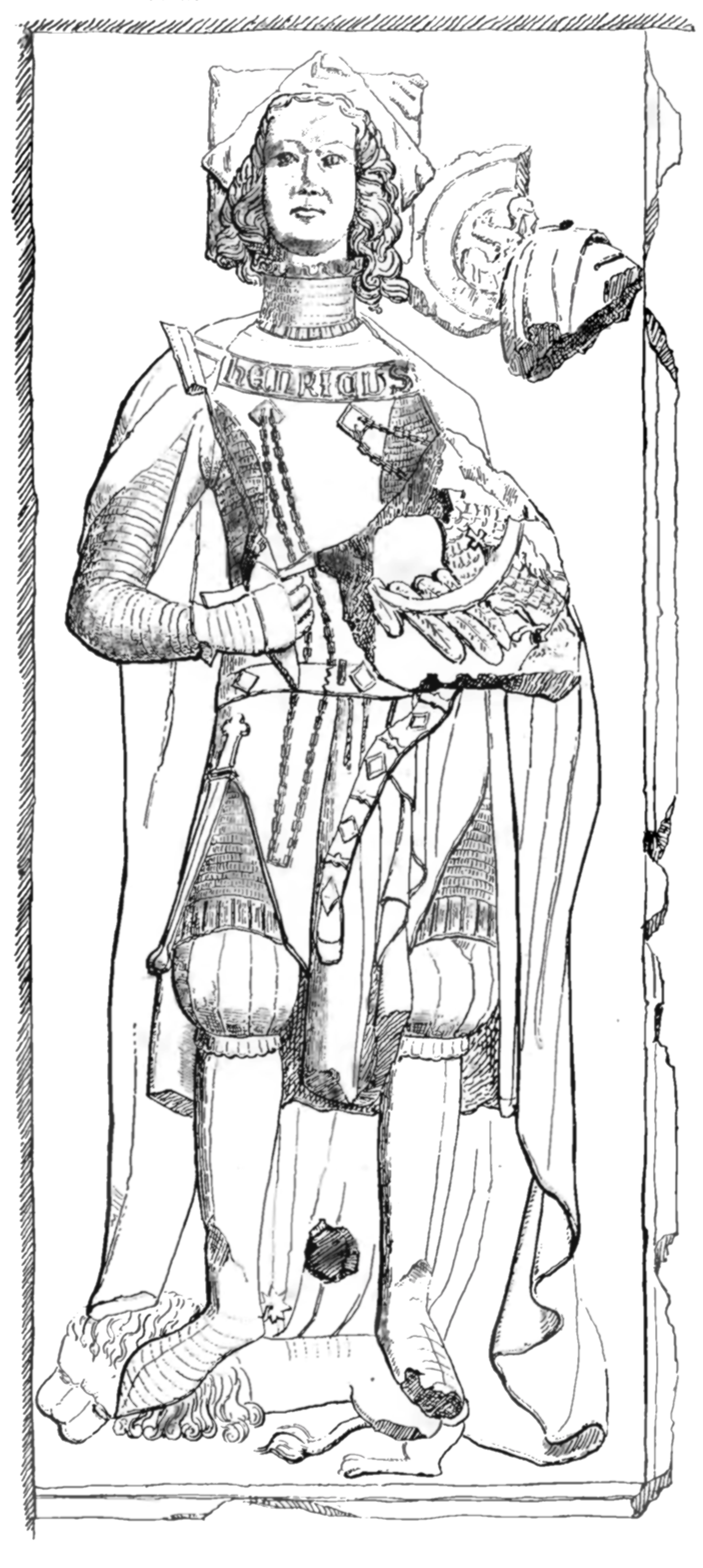 Henryk V Żelazny tomb effigy